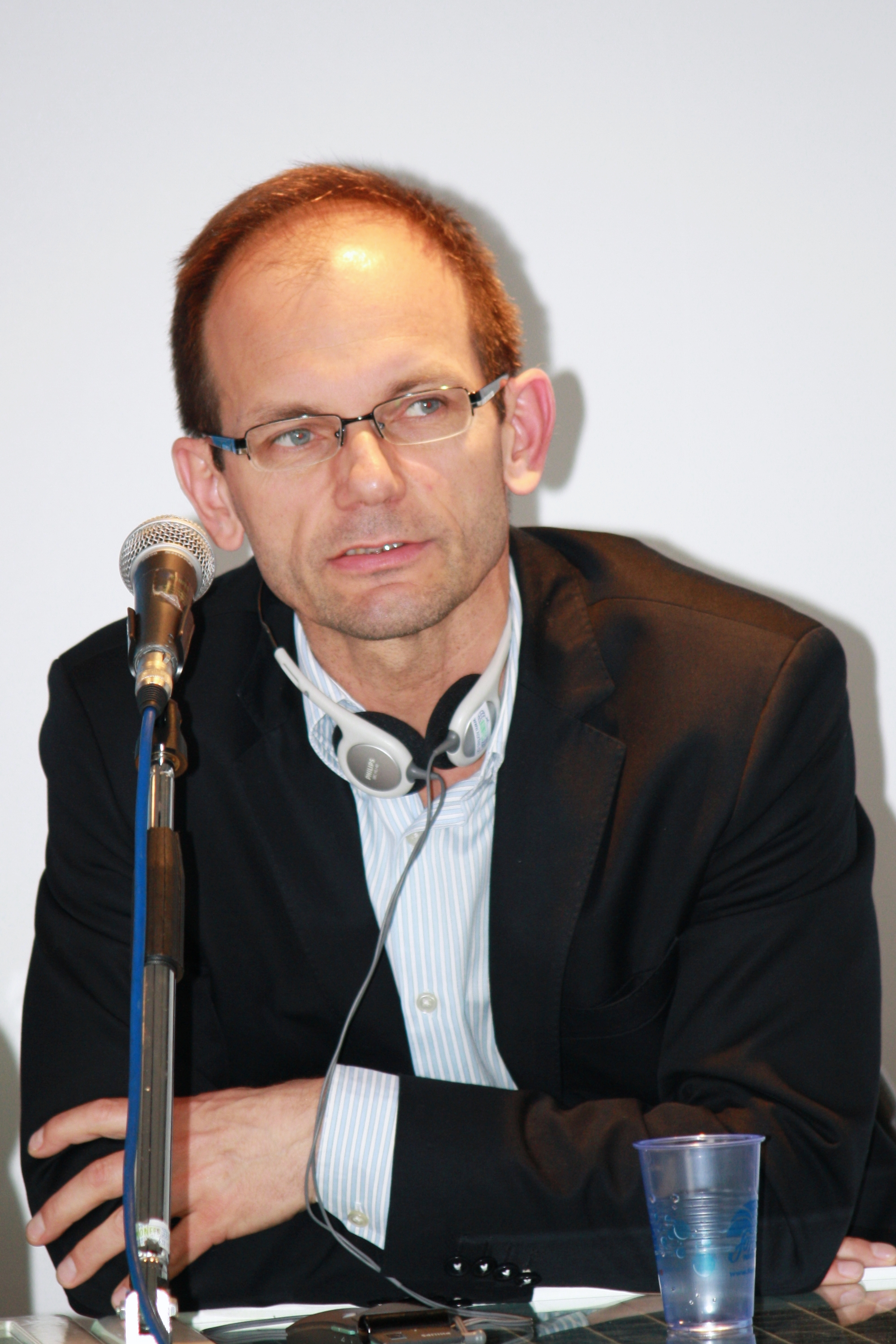 Krzysztof Koehler This photograph was taken with a DSLR from WMCZ's Camera grant. Personality rights warning Although this work is freely licensed or in the public domain, the person(s) shown may have rights that legally restrict certain re-uses unless those depicted consent to such uses. In these cases, a model release or other evidence of consent could protect you from infringement claims.